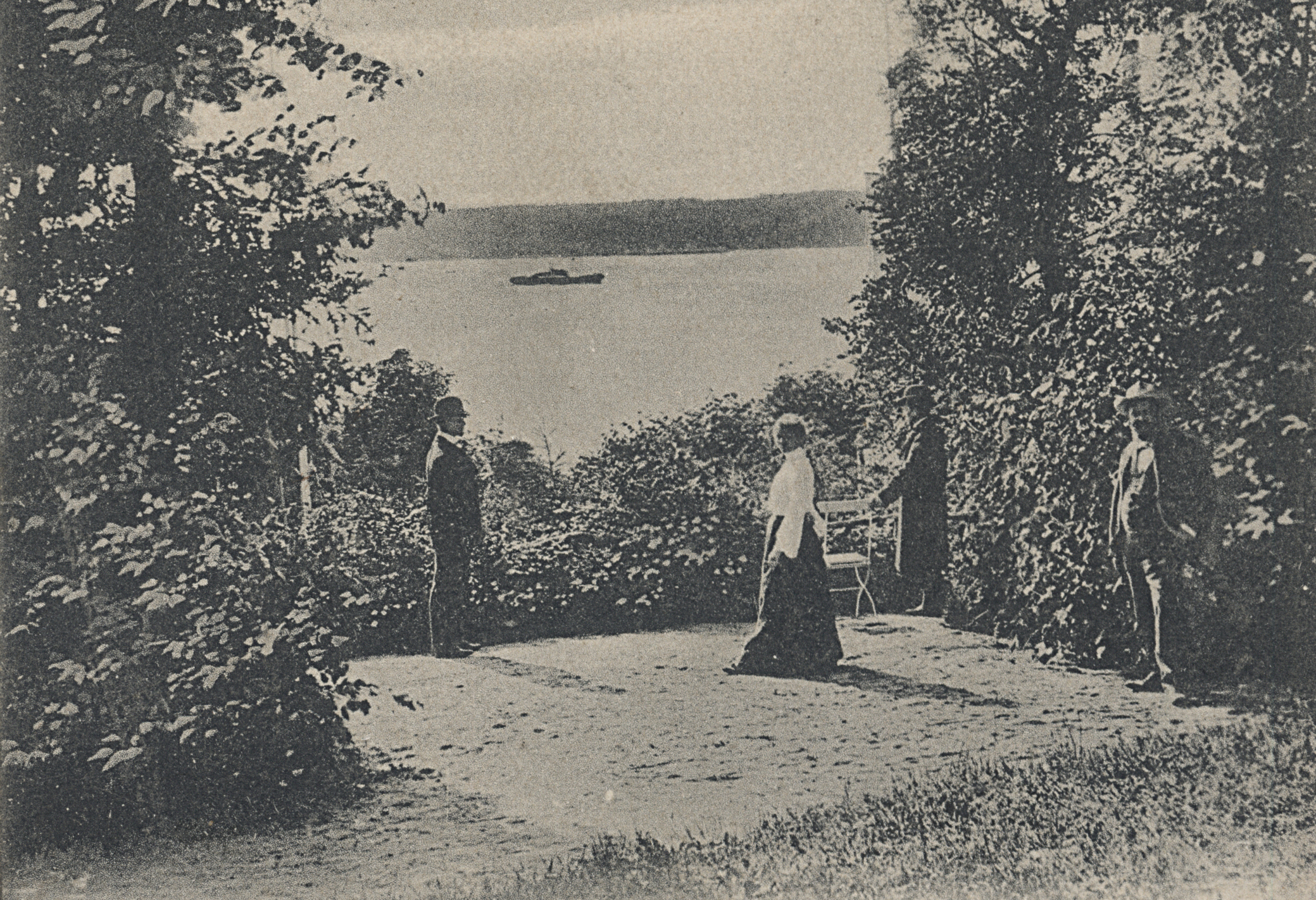 Blick von Mürwik auf die Flensburger Förde um 1900, geerbt; Bild offenbar vom alten Mürwiker Park